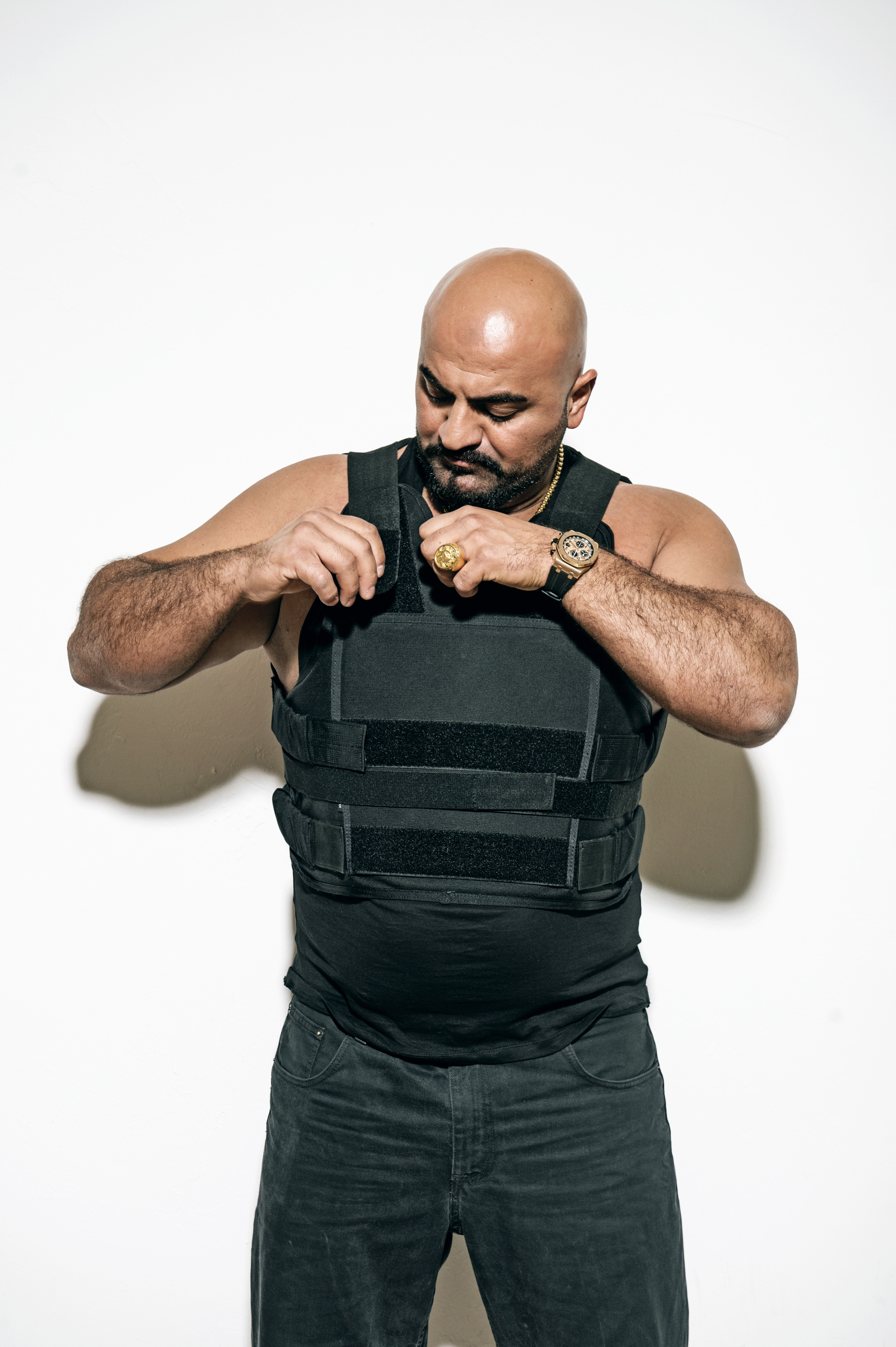 Xatar